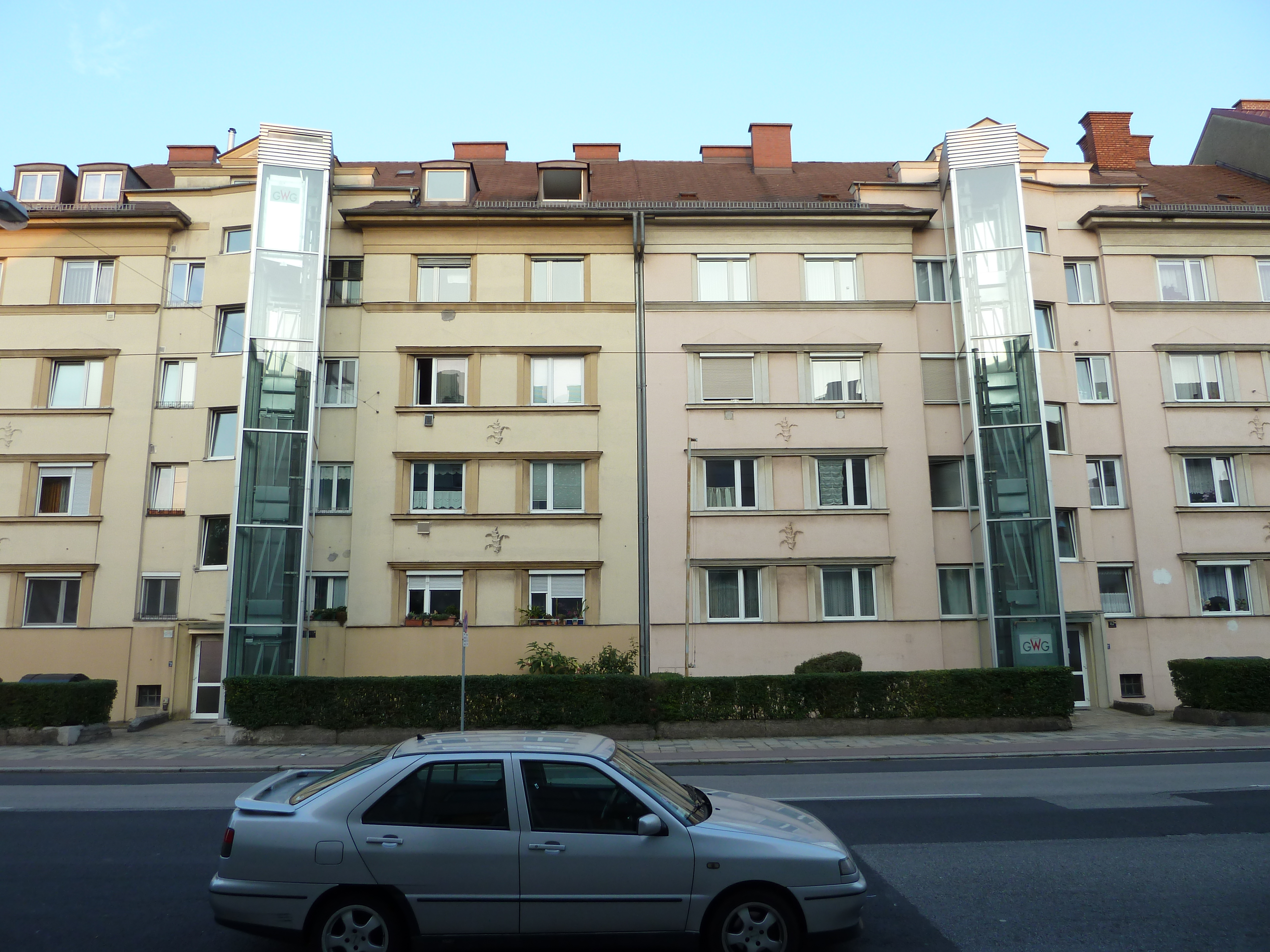 Wohnhaus